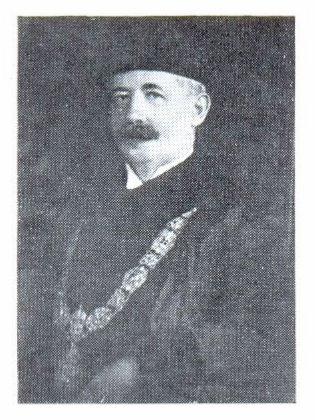 Dézsi Lajos (1868-1932) irodalomtörténész